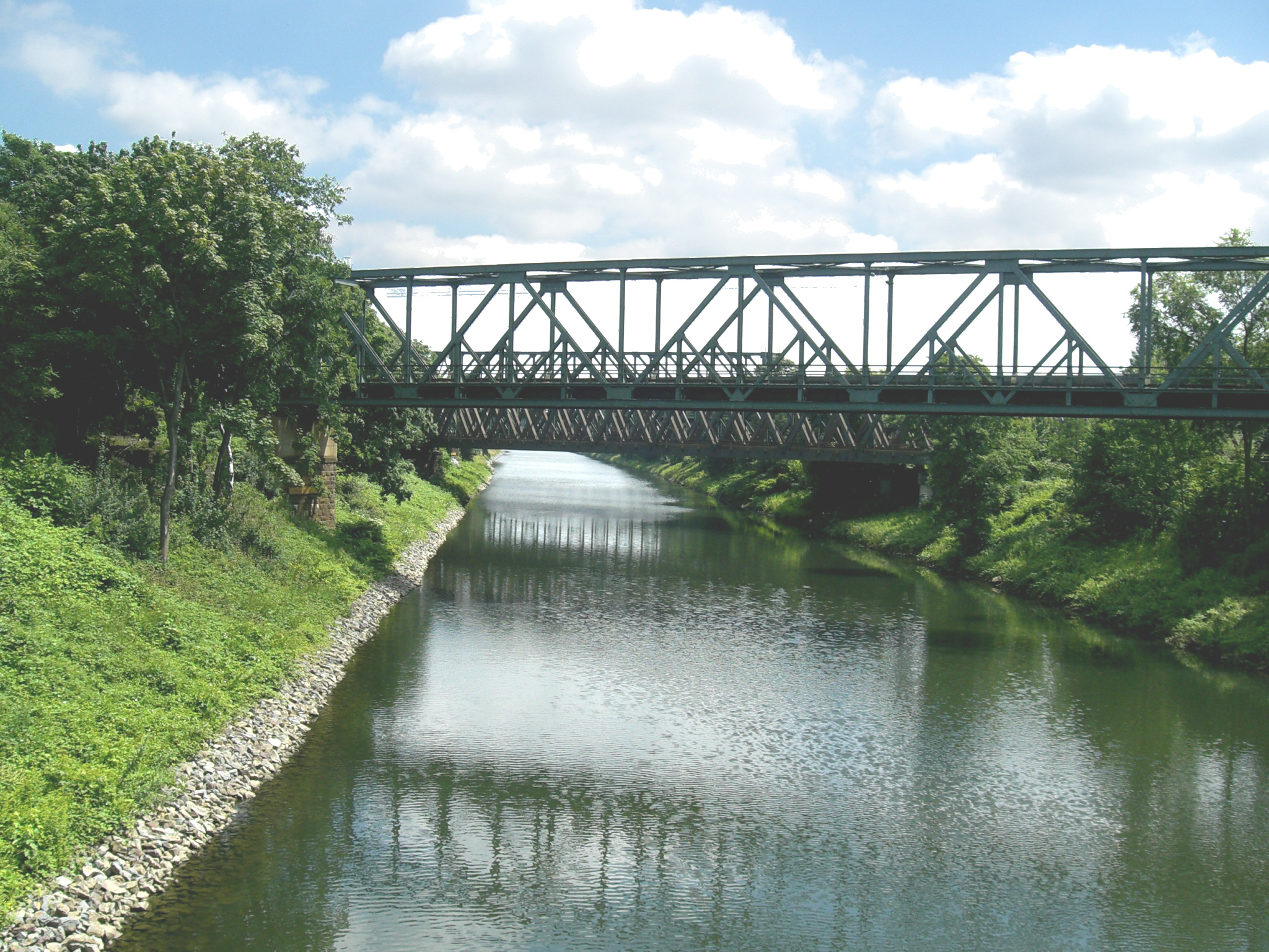 Ruhrschifffahrtskanal. Vorne: Brücke 706 von 1948, dahinter Brücke 706a von 1972